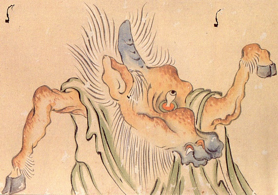 Mumashika (馬鹿) from the Hyakki Yagyō Emaki (百鬼夜行絵巻)